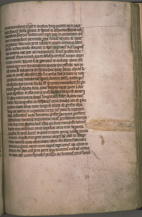 Recto del folio 68 del bestiario di Aberdeen (XII secolo).